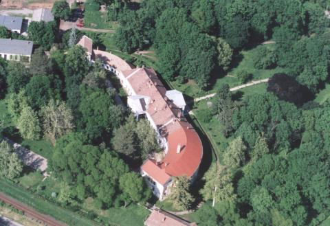 Tiszavasvári, Hungary, aerialphotography